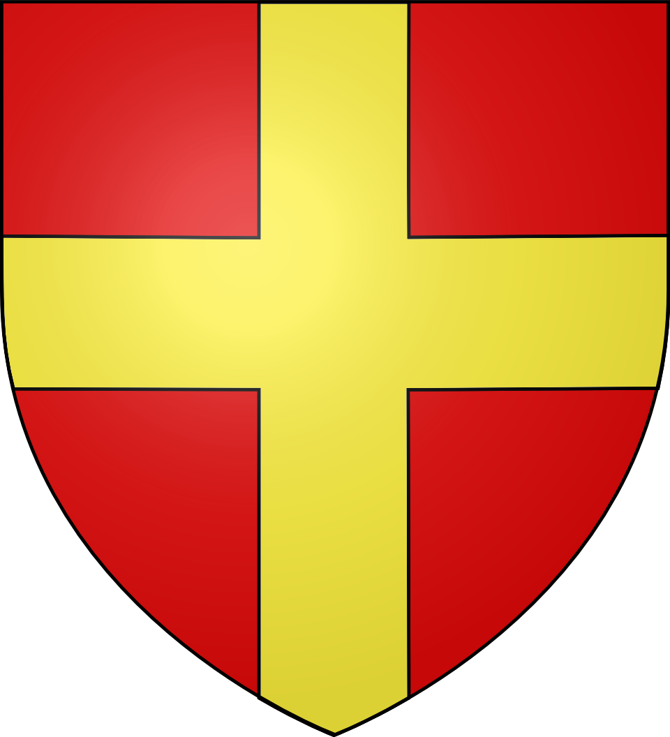 Blason de la ville de Varennes-en-Croix (Somme) : De gueules à la croix d'or